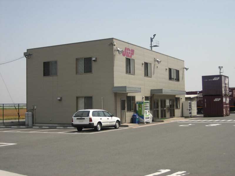 JR貨物 刈谷オフレールステーションの事務所